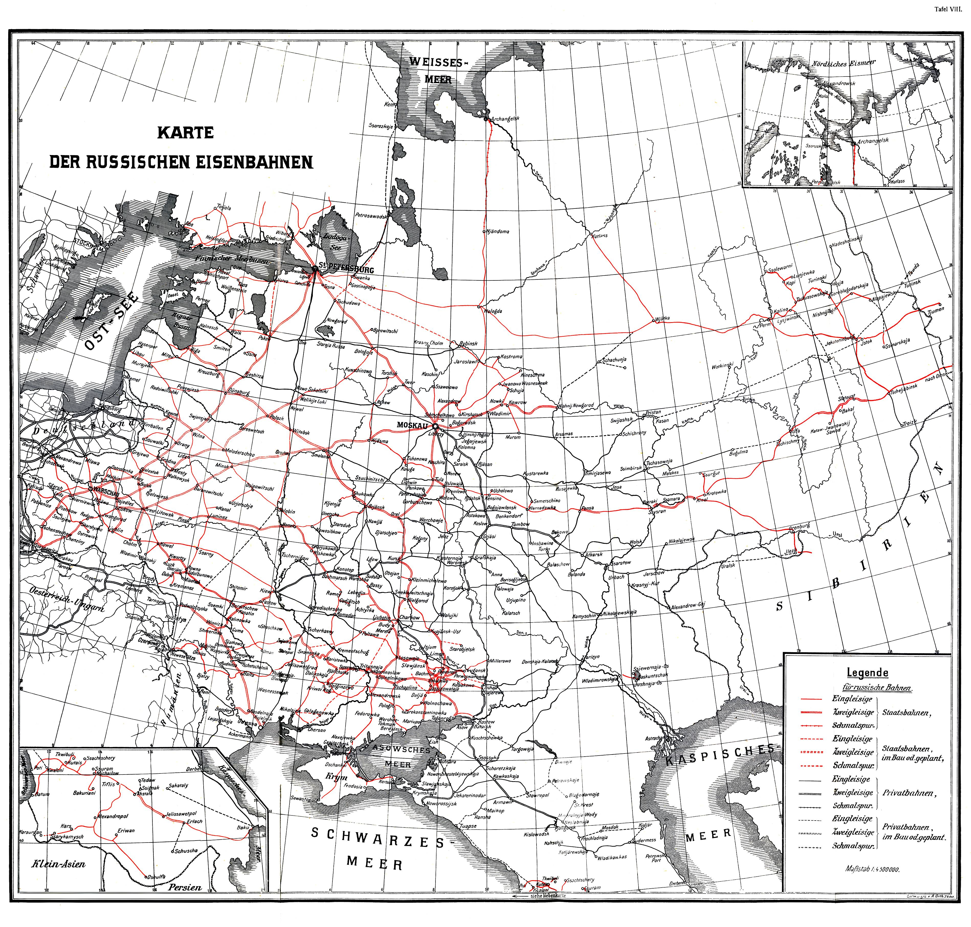 Karte der Russischen Eisenbahnen